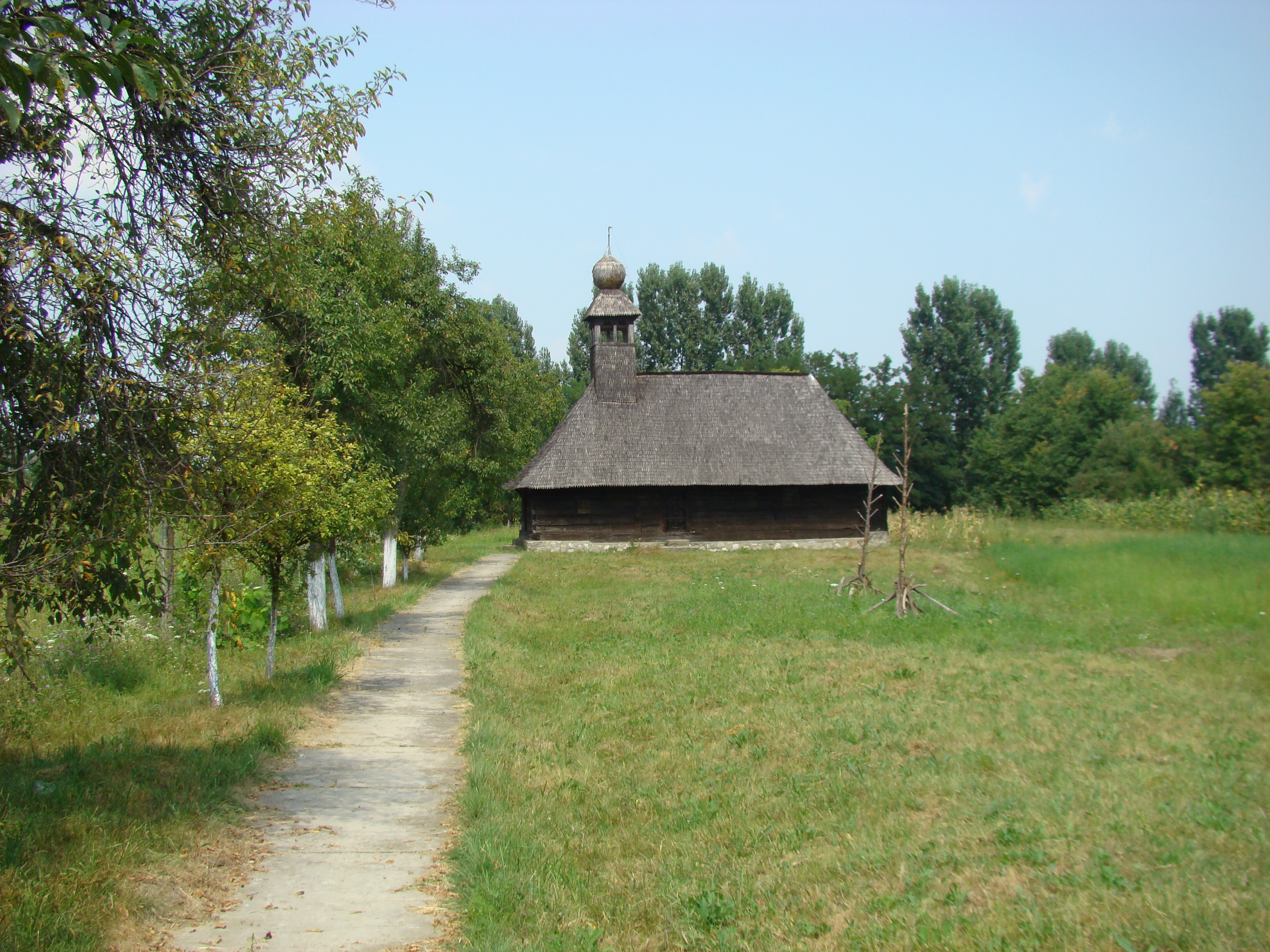 Biserica de lemn „Cuvioasa Paraschiva” din Bătești-Timiș